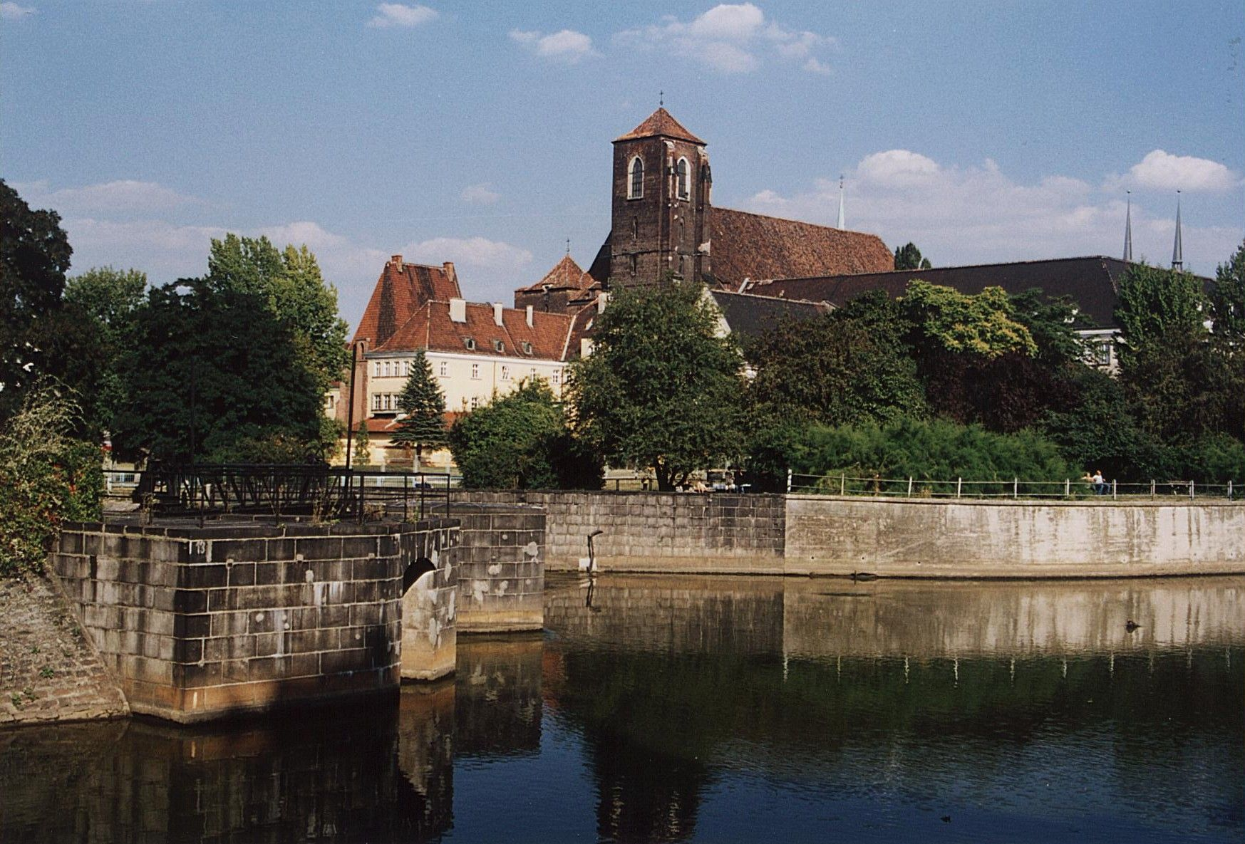 1Wrocław Śródmieście - kościół parafialny NMP „Na Piasku” , dawny klasztorny; św. Jadwigi (zabytek nr 430/82)